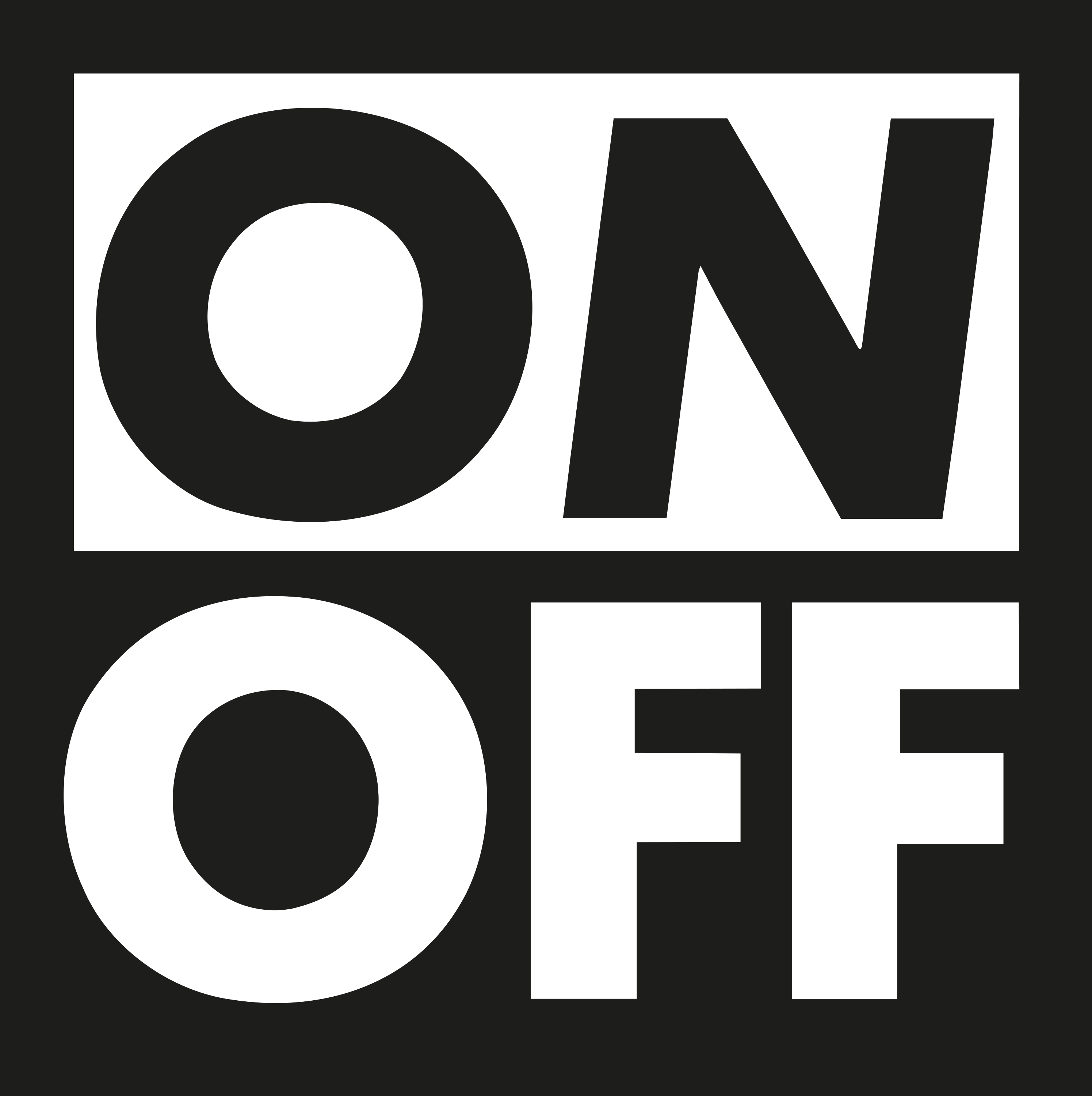 on/off, société de production spécialisée dans la conception d'identité de chaîne et d'habillage d'antenne par Etienne Robial